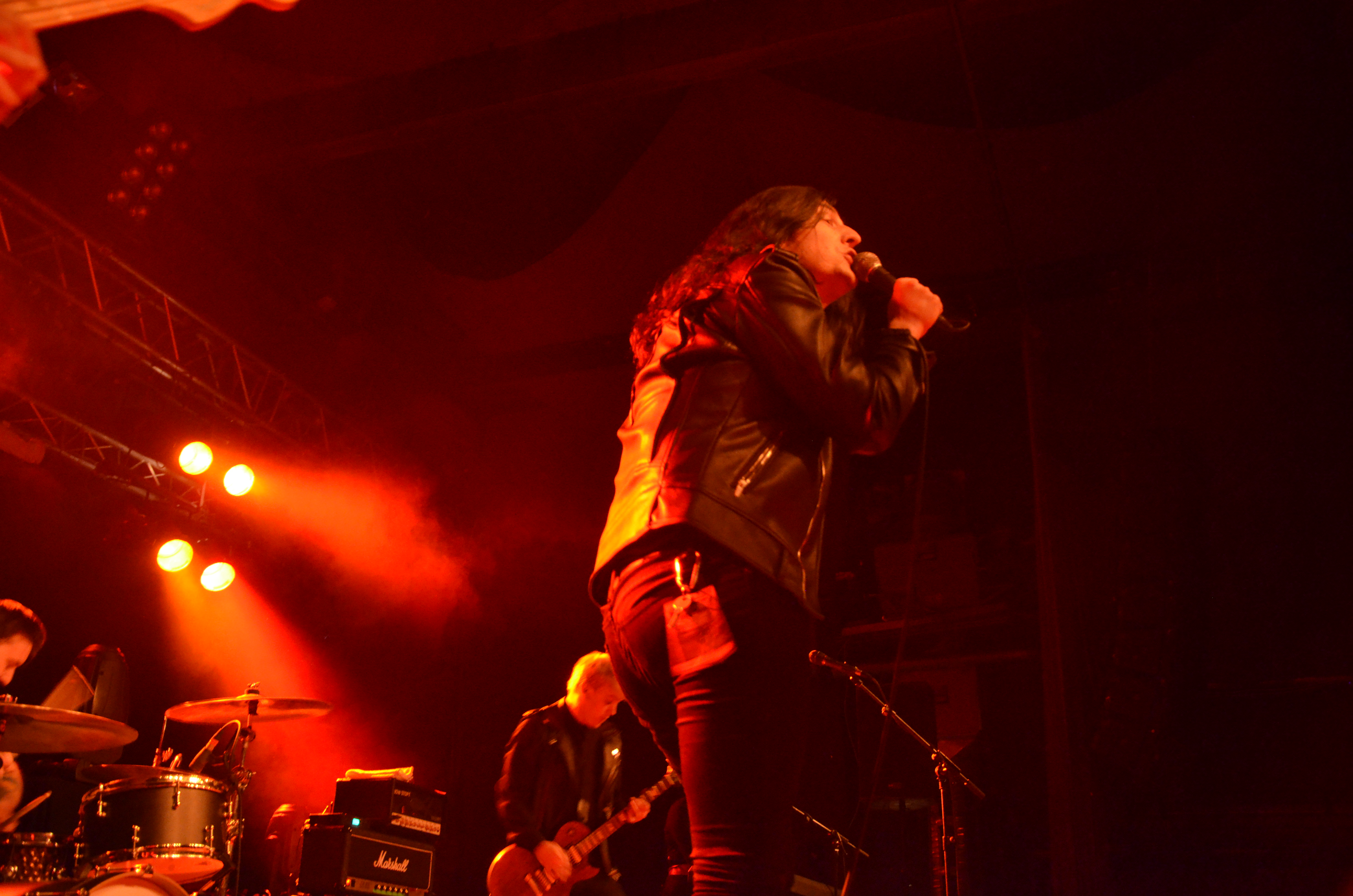 Creeper spielen in der Live Music Hall in Köln, 2016.